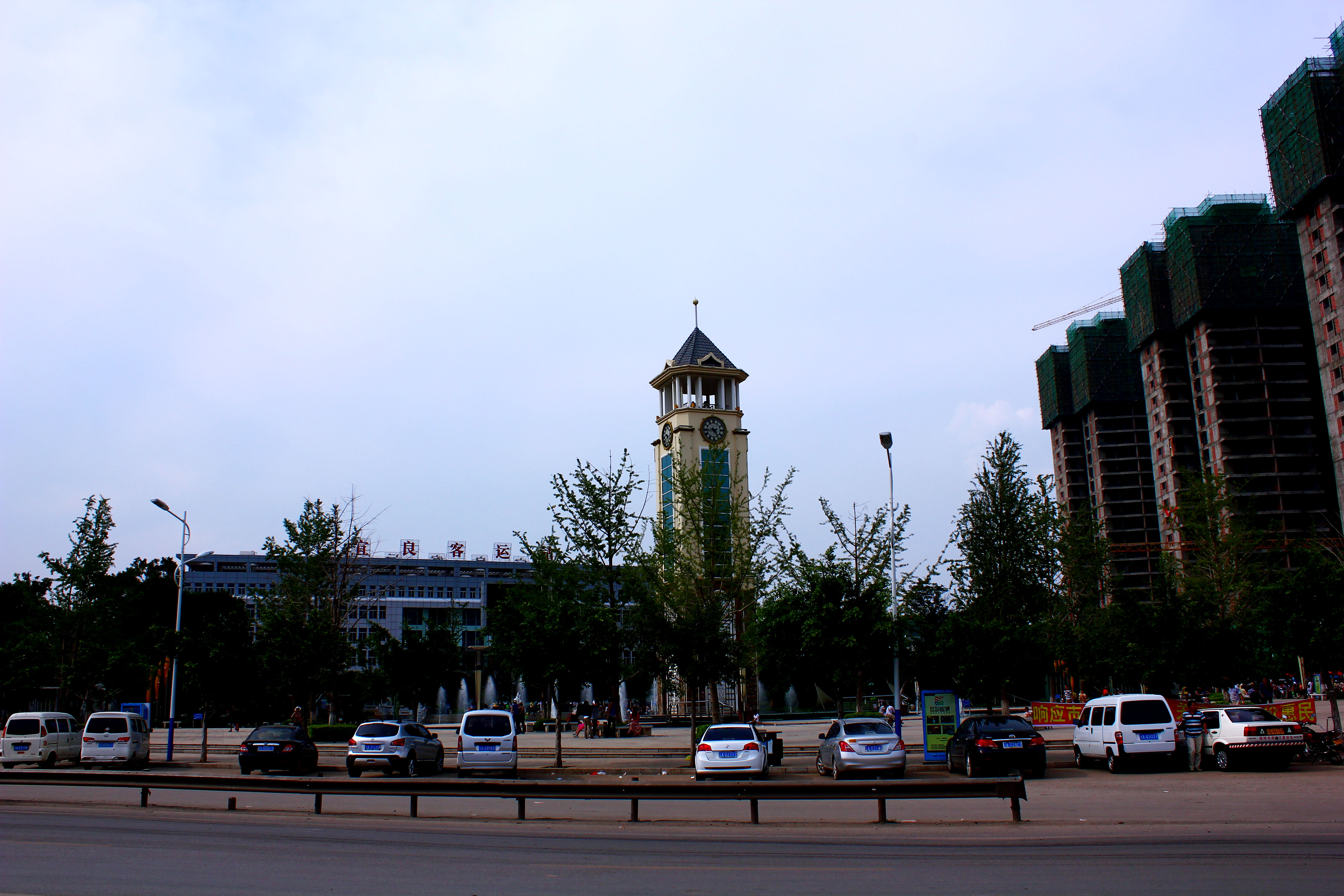 云南省昆明市宜良县客运站